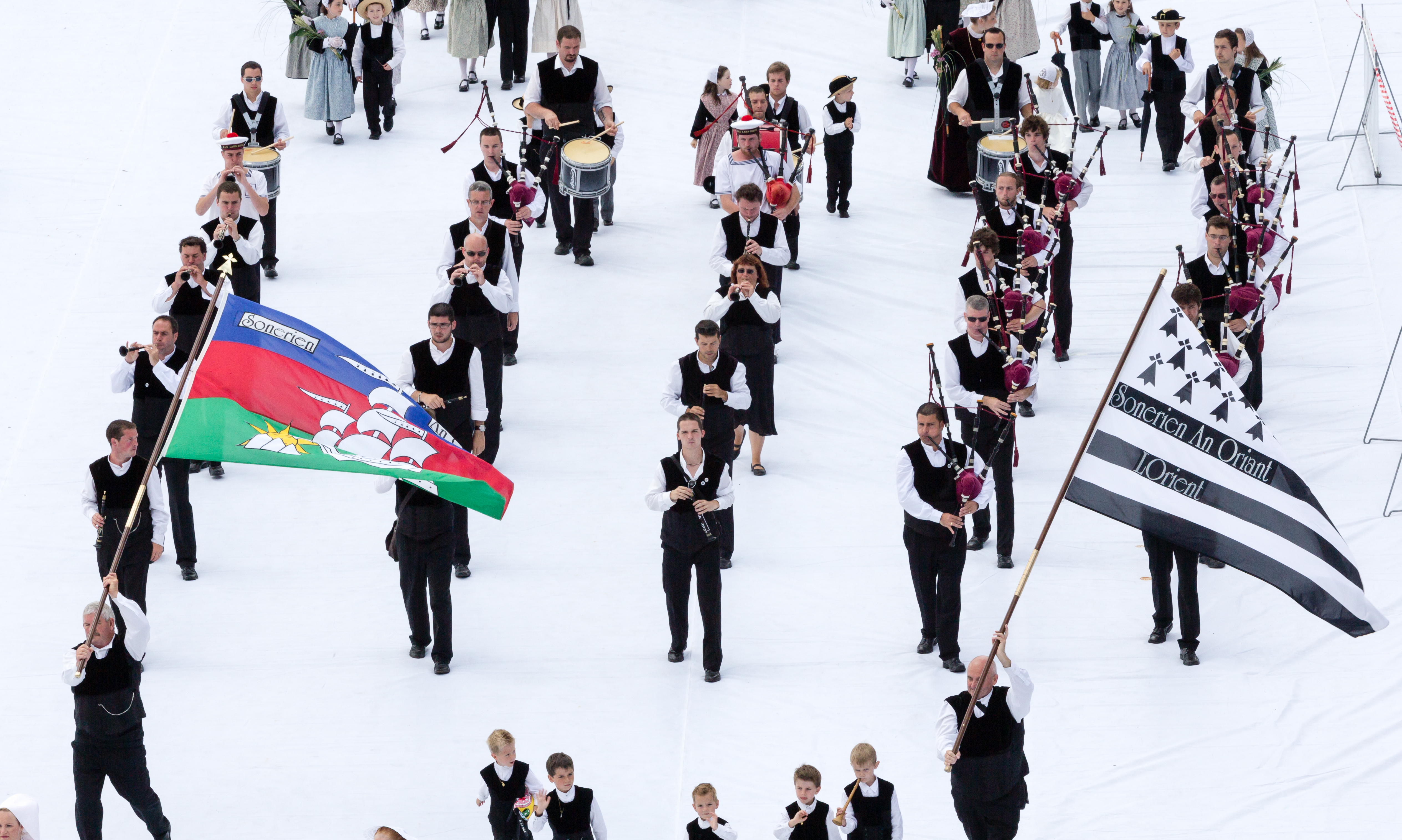 FIL 2012 - Arrivée de la grande parade des nations celtes - Sonerien an Oriant